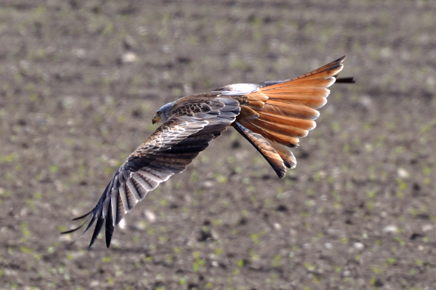 Switzerland, Canton of Schaffhausen, red kite in flight near Gennersbrunn